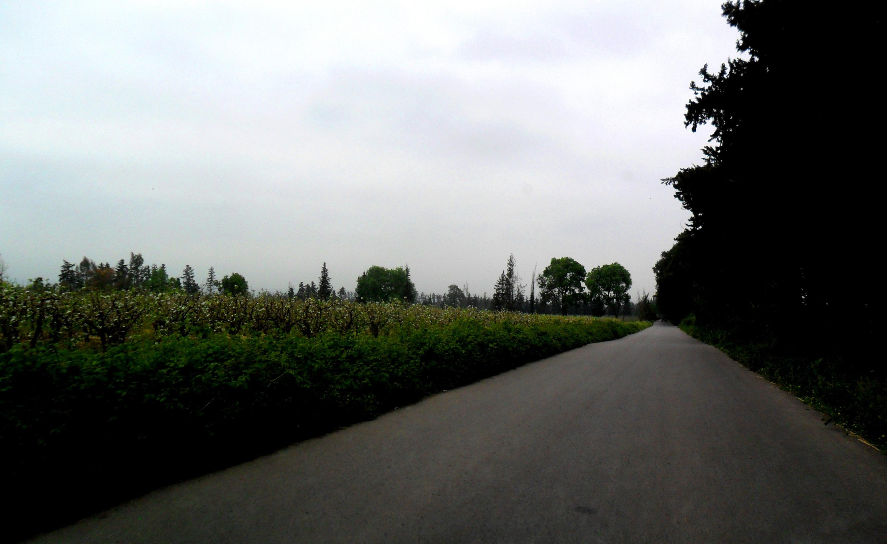 Oued El Alleug واد العلايق